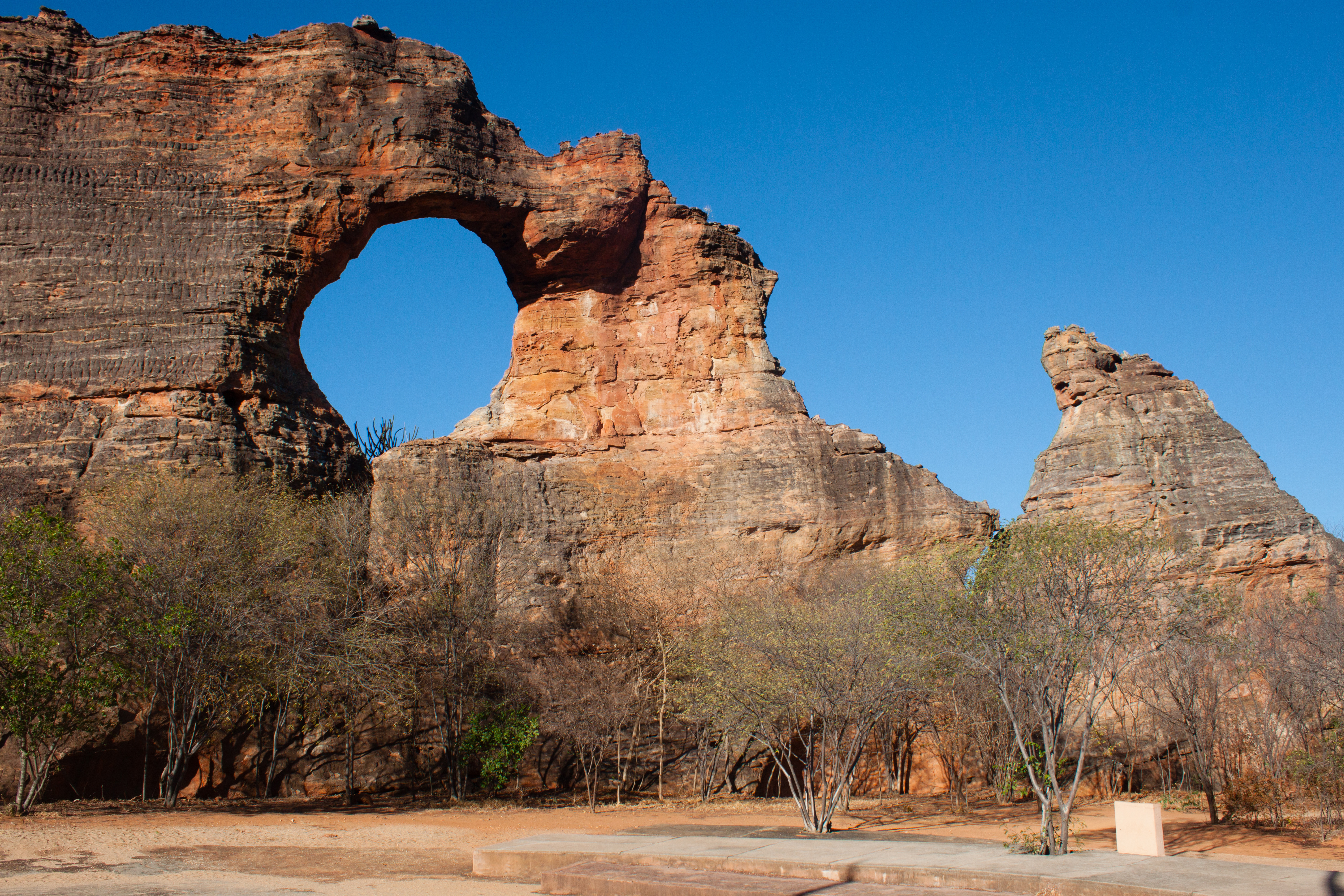 Pedra Furada, Parque Nacional da Serra da Capivara/PI.